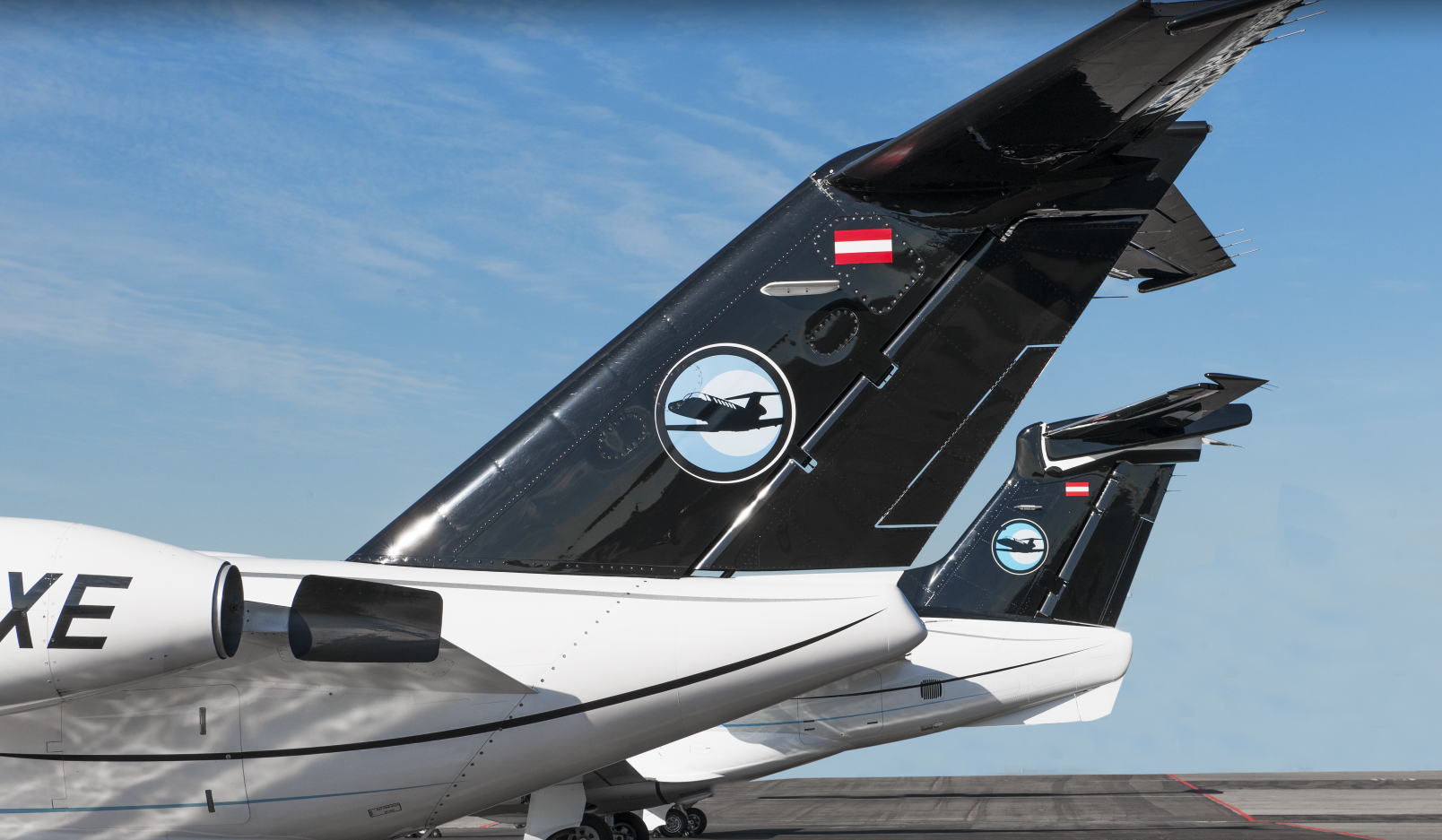 Depuis Genève